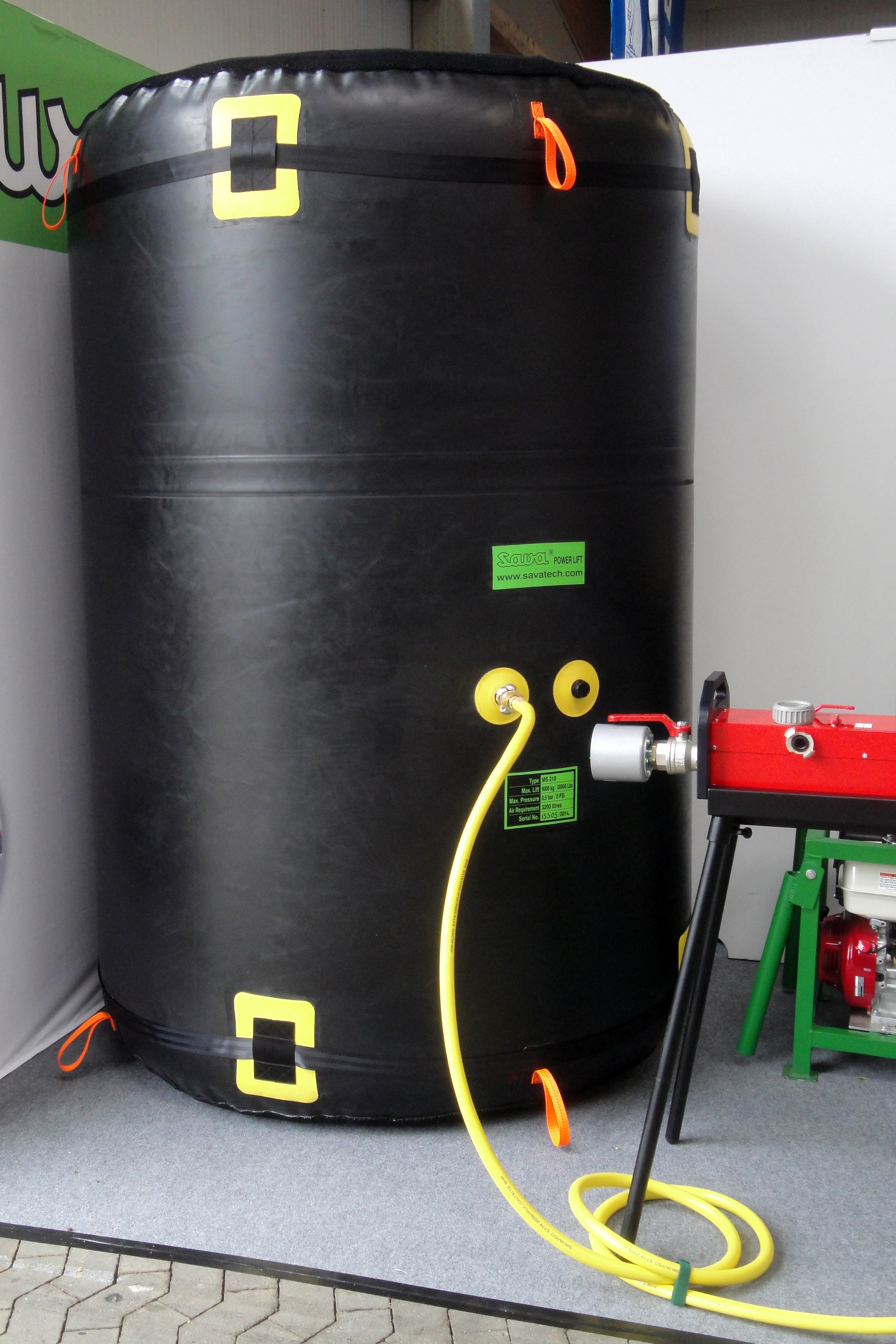 Hebekissen Sava MS 210, Sava (Trelleborg Slovenija), Internationale Fachausstellung Bergen und Abschleppen 2016, Kassel